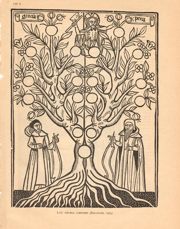 arbol ciencia ramon llull